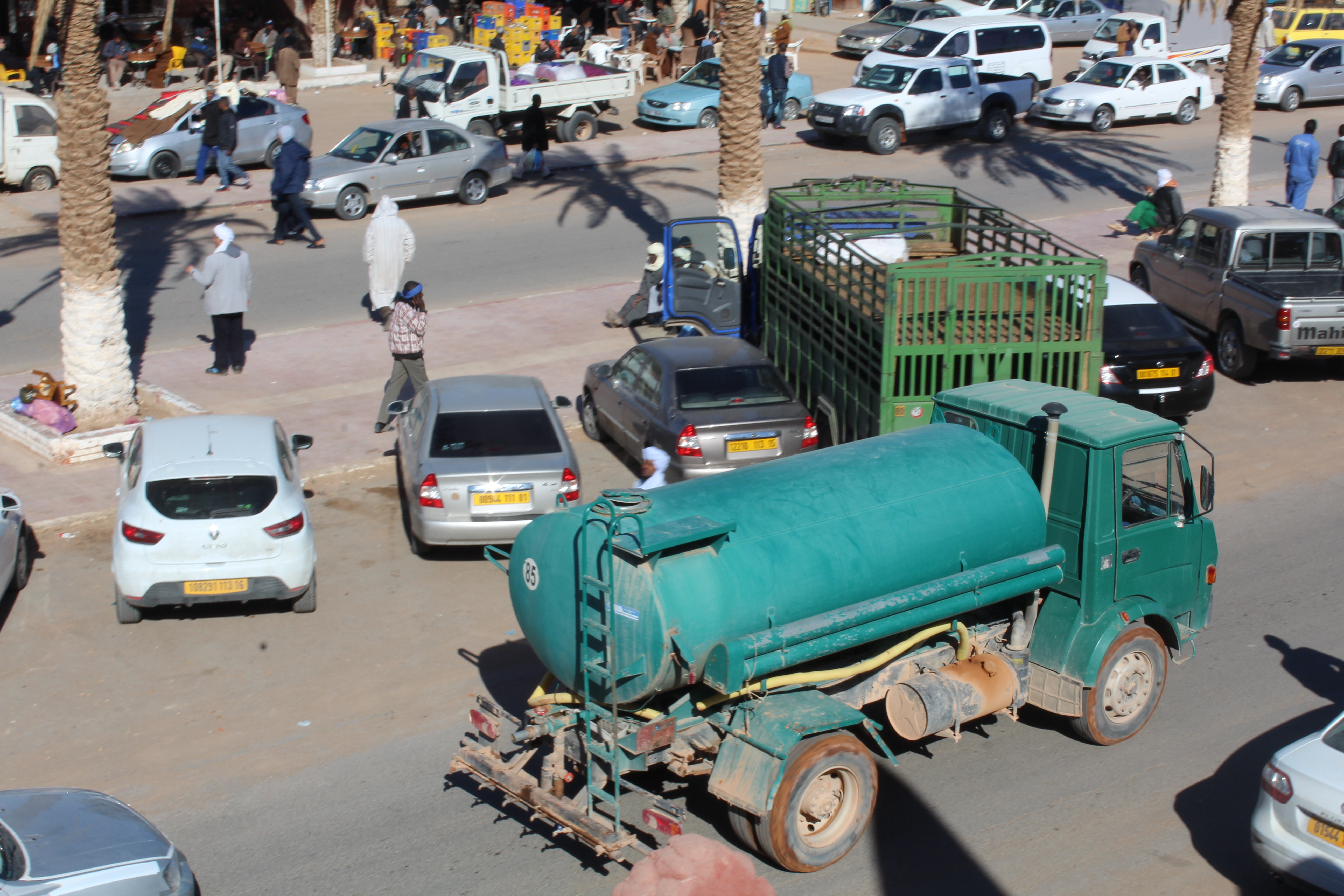 شاحنة صهريج تابعة لبلدية تيميمون من نوع ك120 علامة SNVI